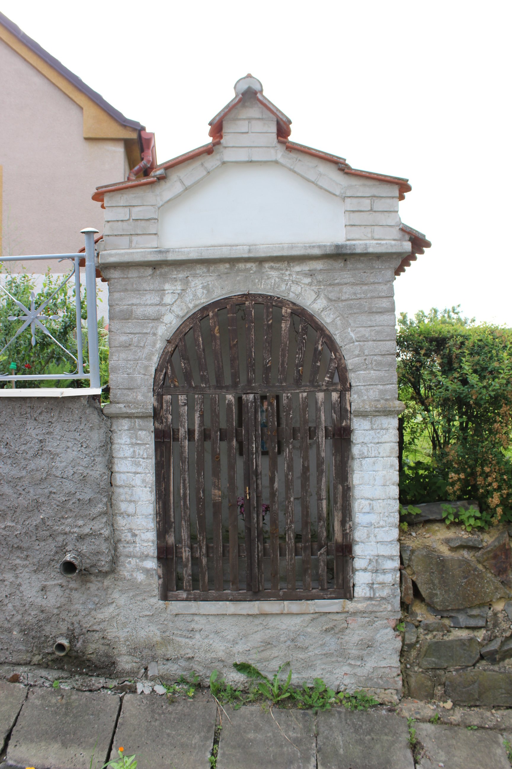 Boží muka v Ryšíně, částli Pavlíkova (pohled od jihovýchodu).